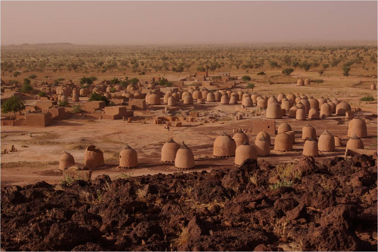 丸いとんがり屋根の穀物保存庫がならび、本当に幻想的な風景だった 【ニジェール・タウア州・ジャジャ村、2009年11月】